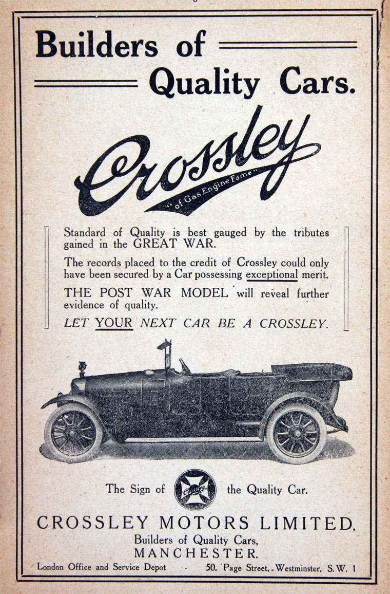 Anuncio de Crossley Motors (1917)